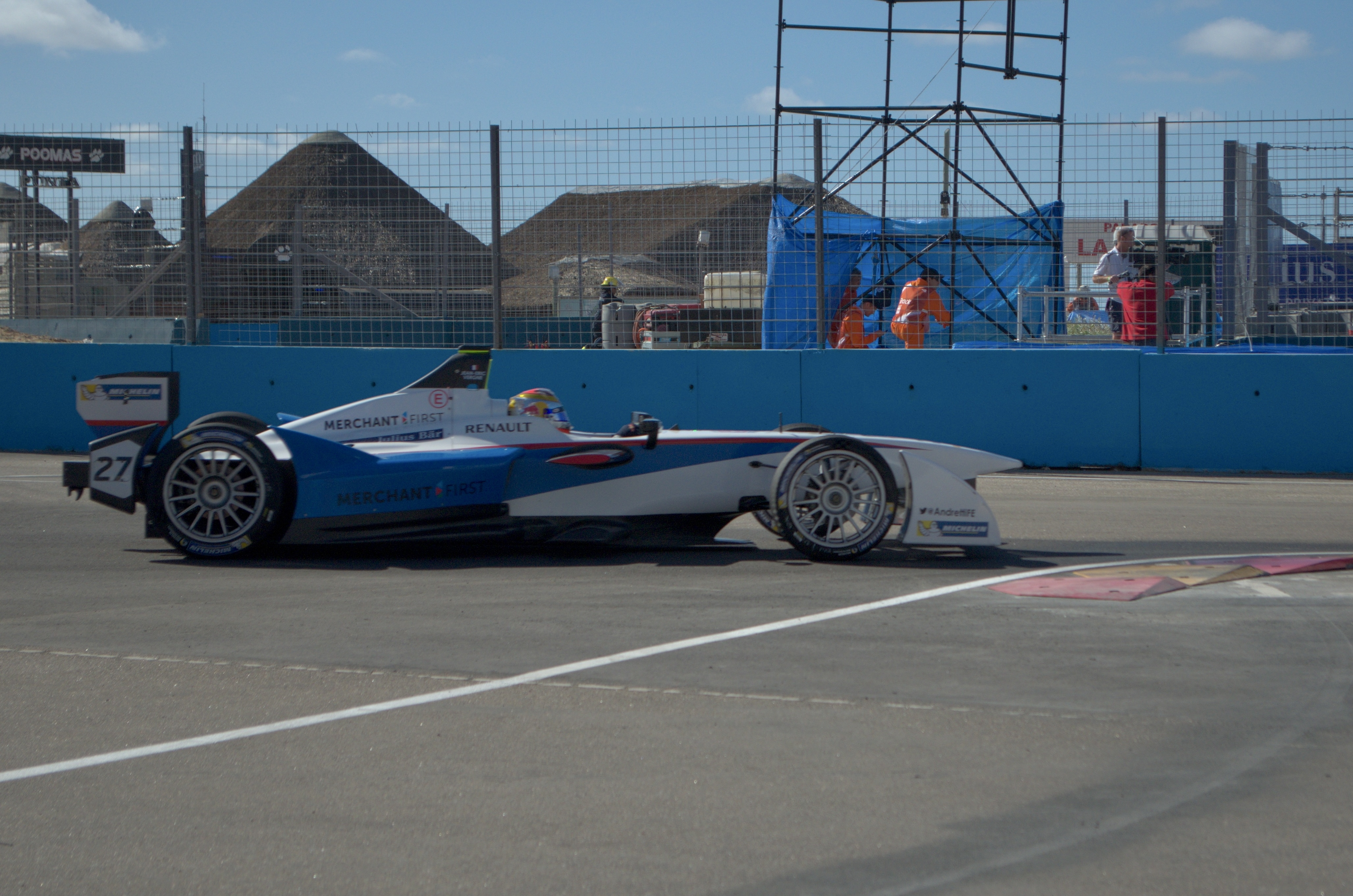 Solo se permite el uso de esta imagen mencionando a Velocidad Total como su autor. Imagen del equipo Andretti de Fórmula E, durante el Punta del Este ePrix de 2014.